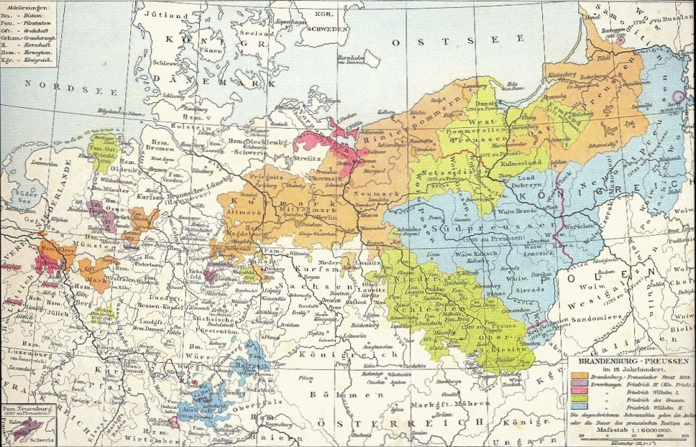 Preußen im 18. Jahrhundert